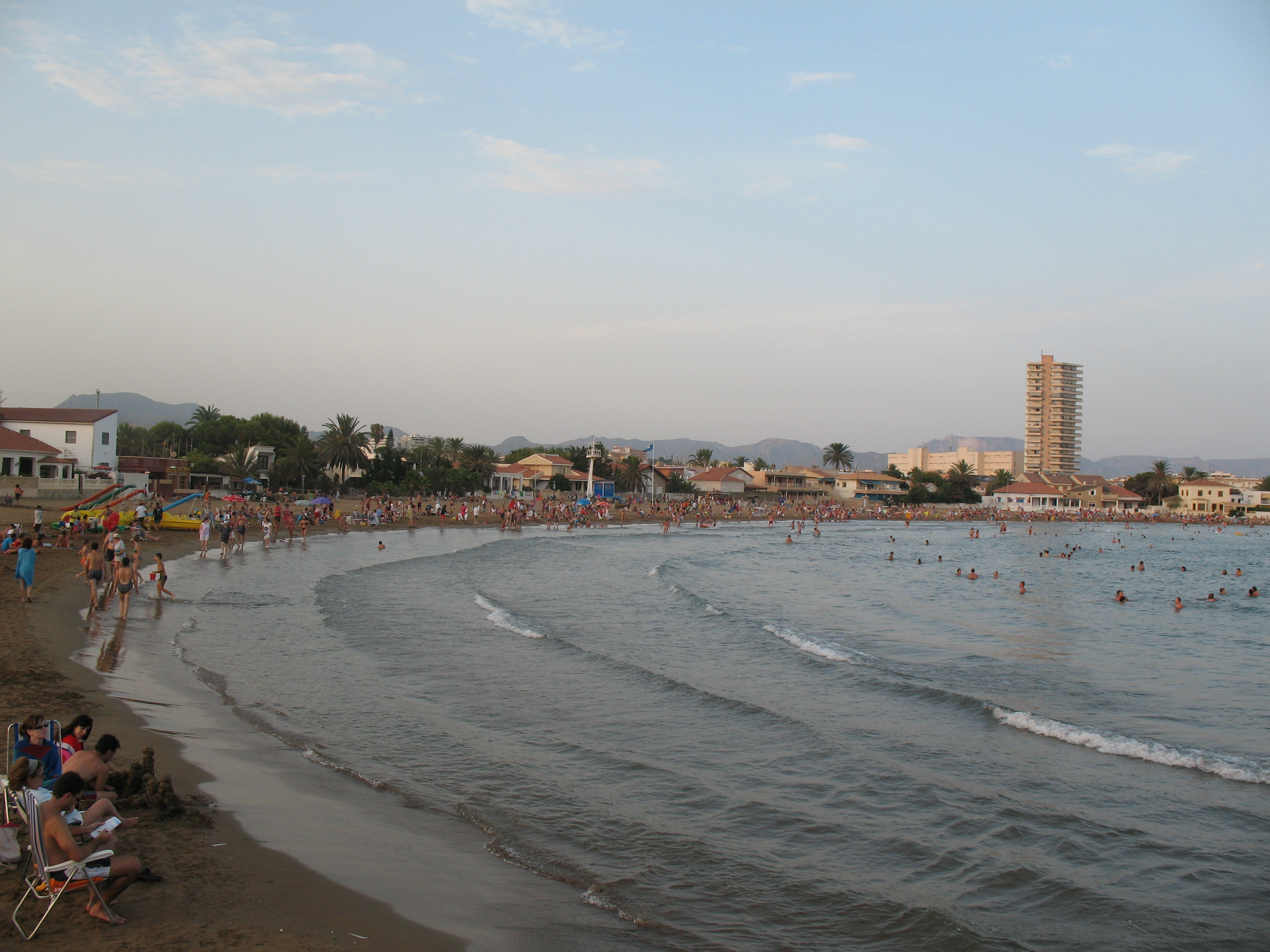 Playa de Bahía en Mazarrón, Murcia, Spain.